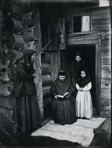 Old Believers nuns (Уставщицы)